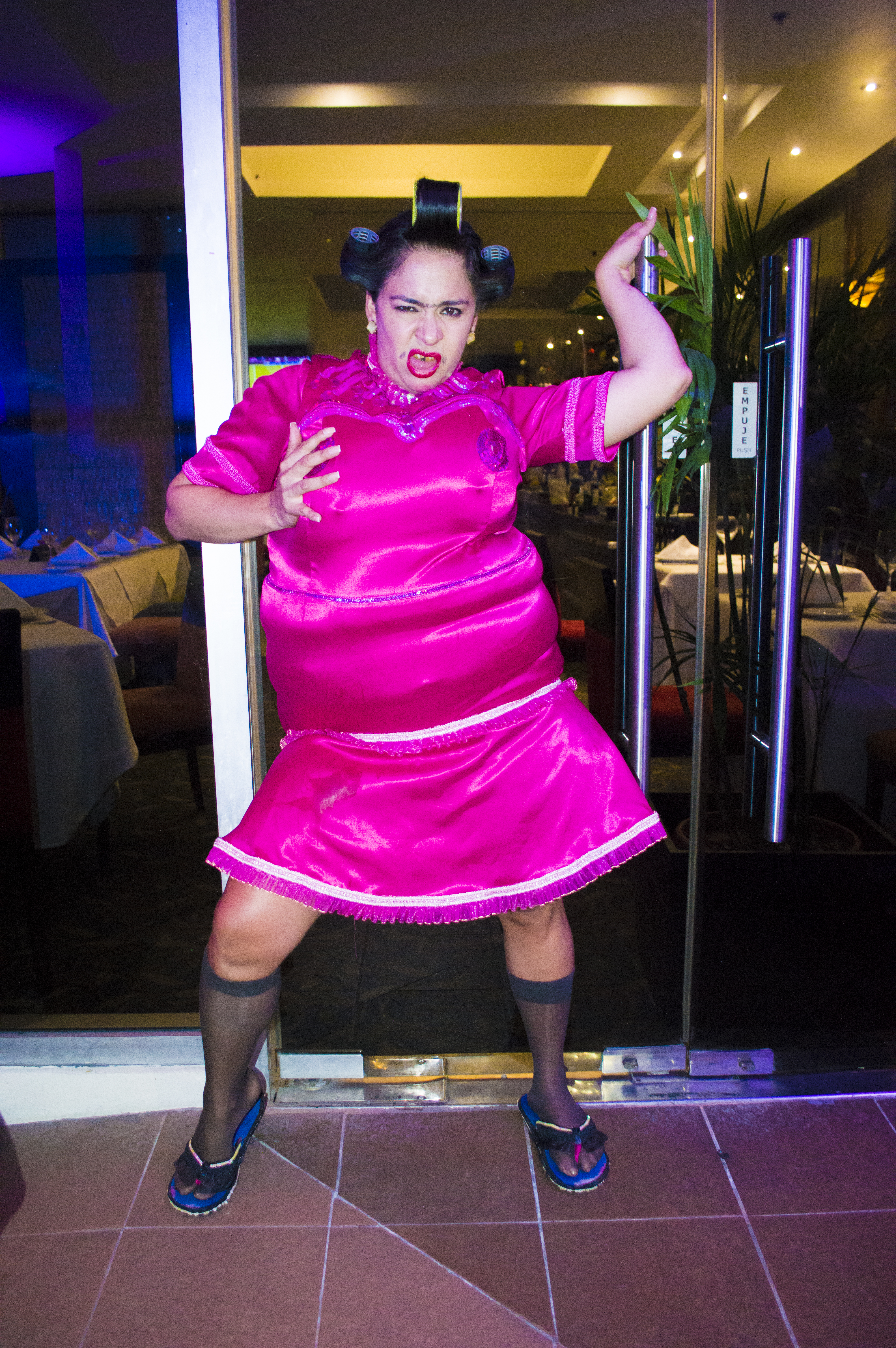 La Mofle, personaje interpretado por Flor María Palomeque en 2017.